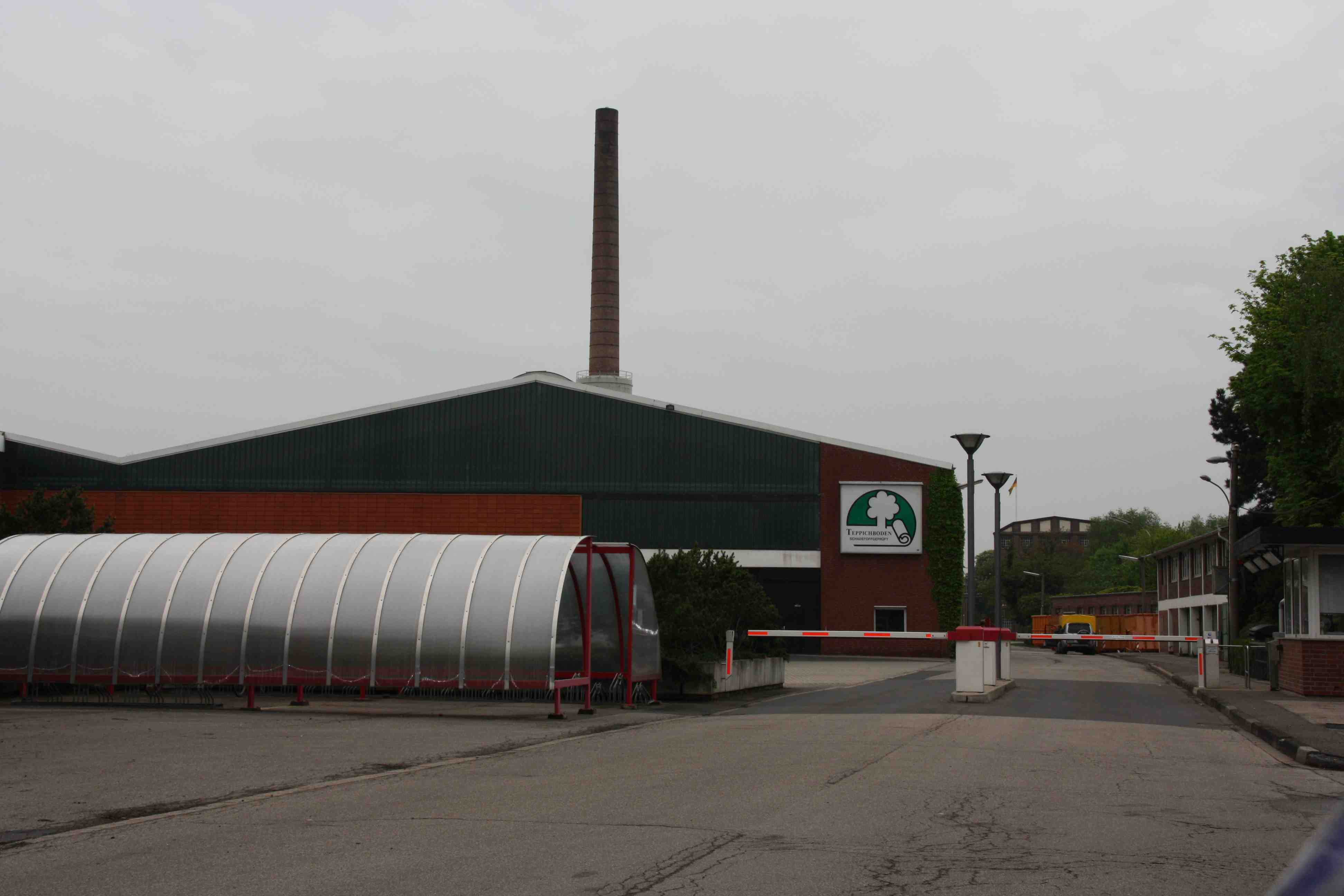 Zufahrt zur Firma